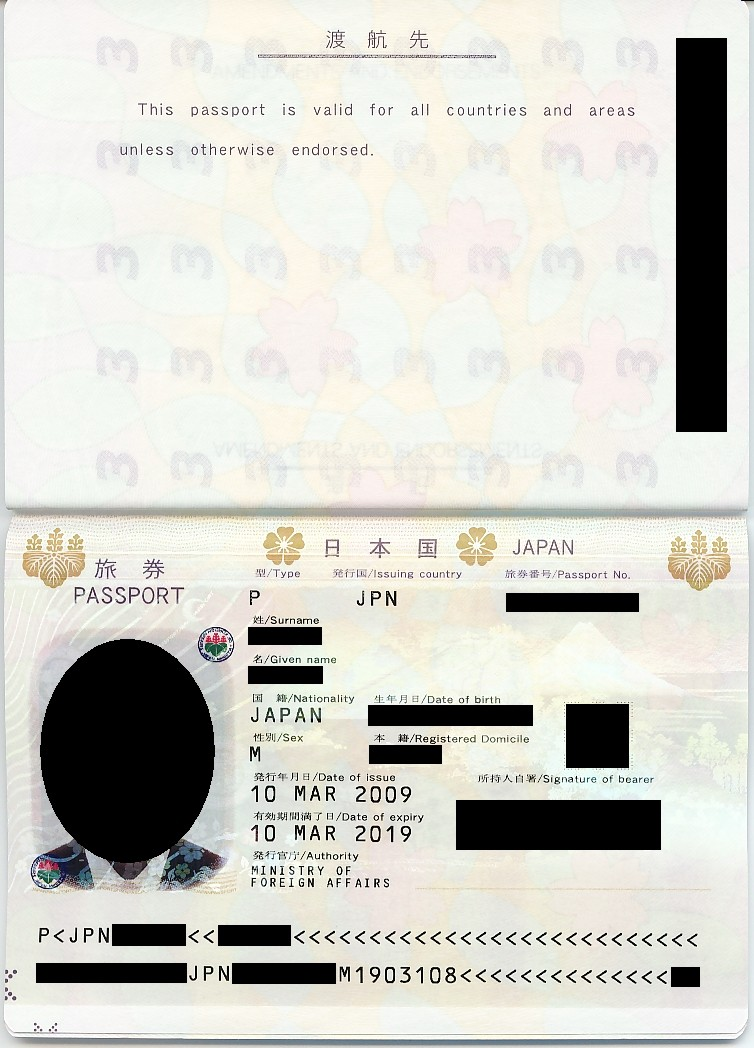 日本国旅券 身分証明欄